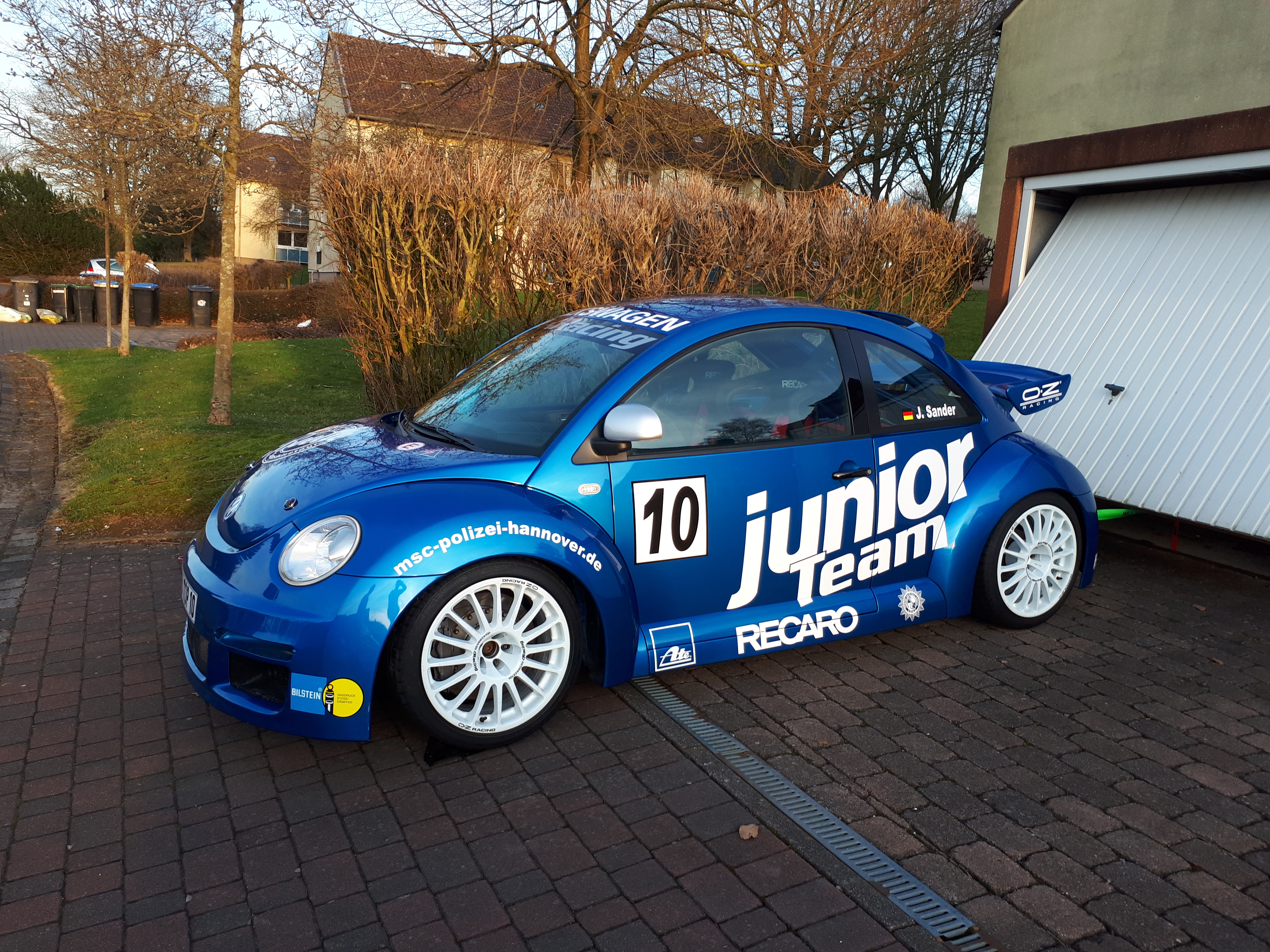 New Beetle Cup 2002 Originalzustand Heckansicht